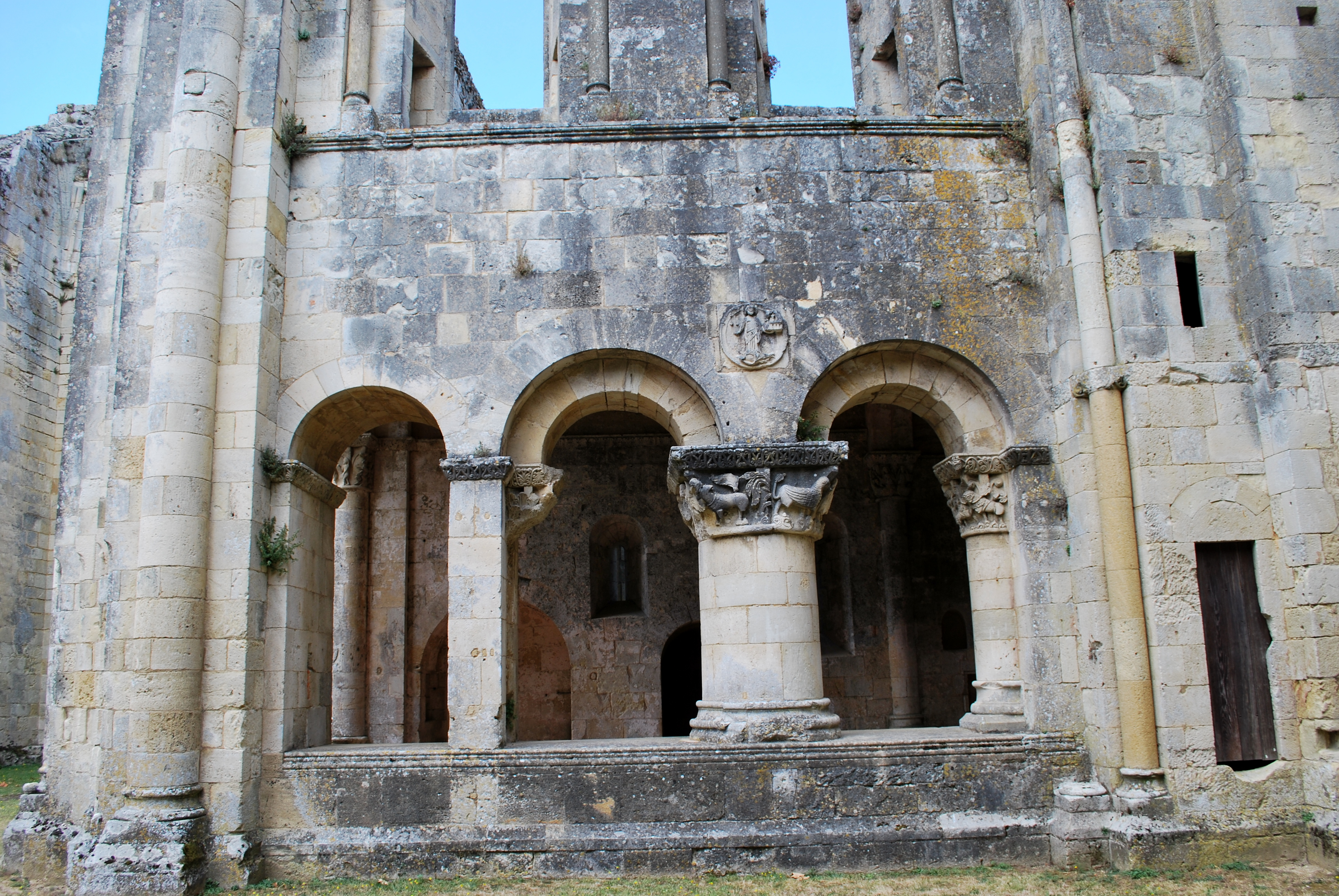 Triple arcade nord de l'Abbaye de la Sauve-Majeure